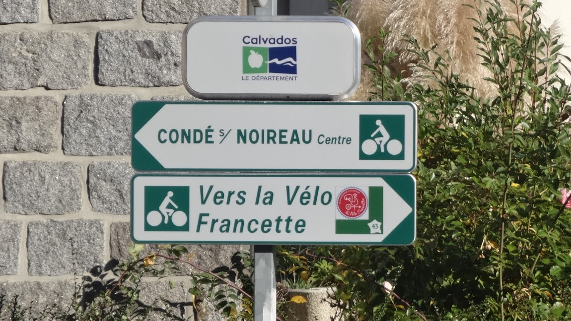 en Suisse-normande